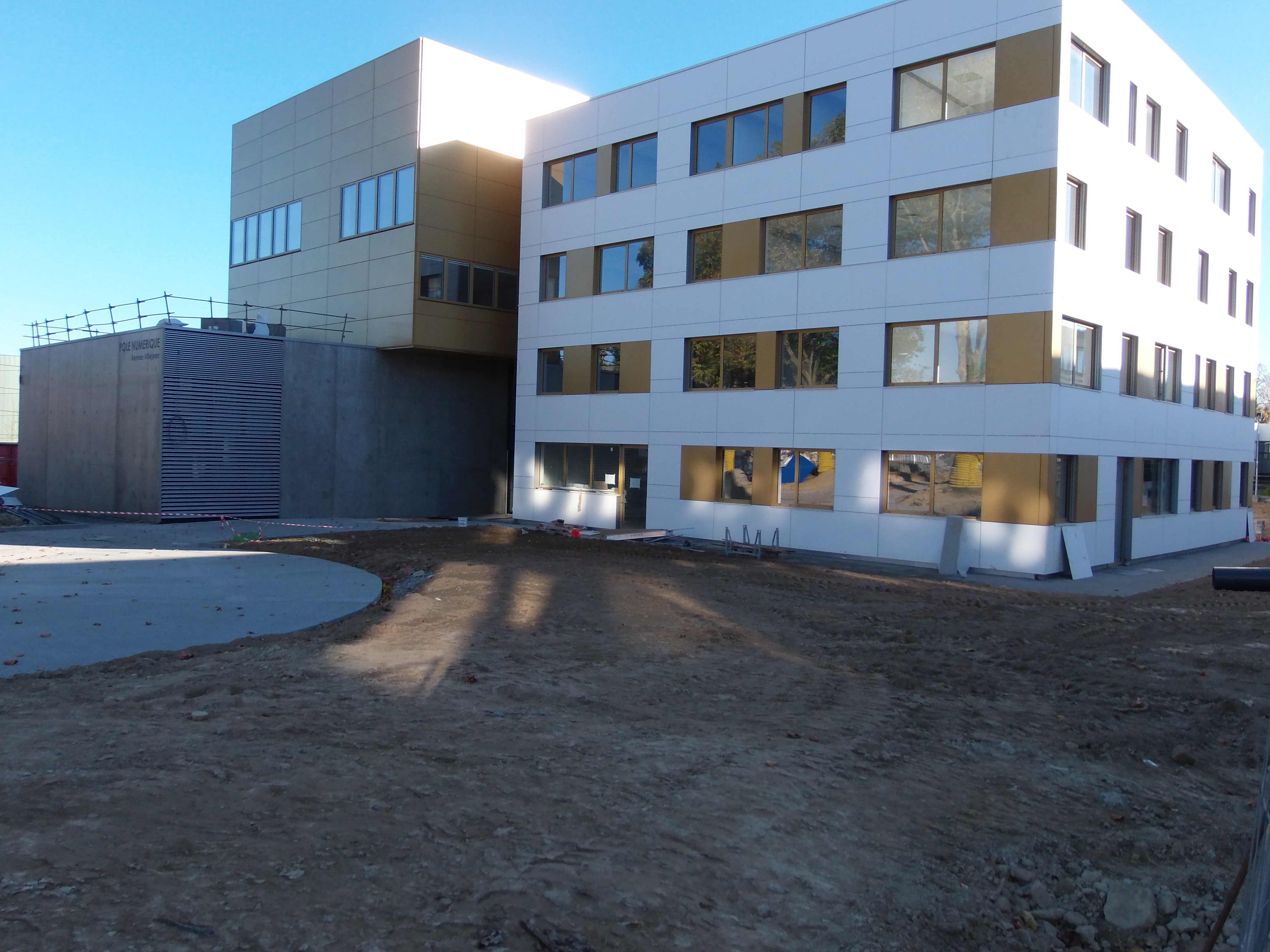 Construction du pôle numérique Rennes Villejean, Université Rennes 2